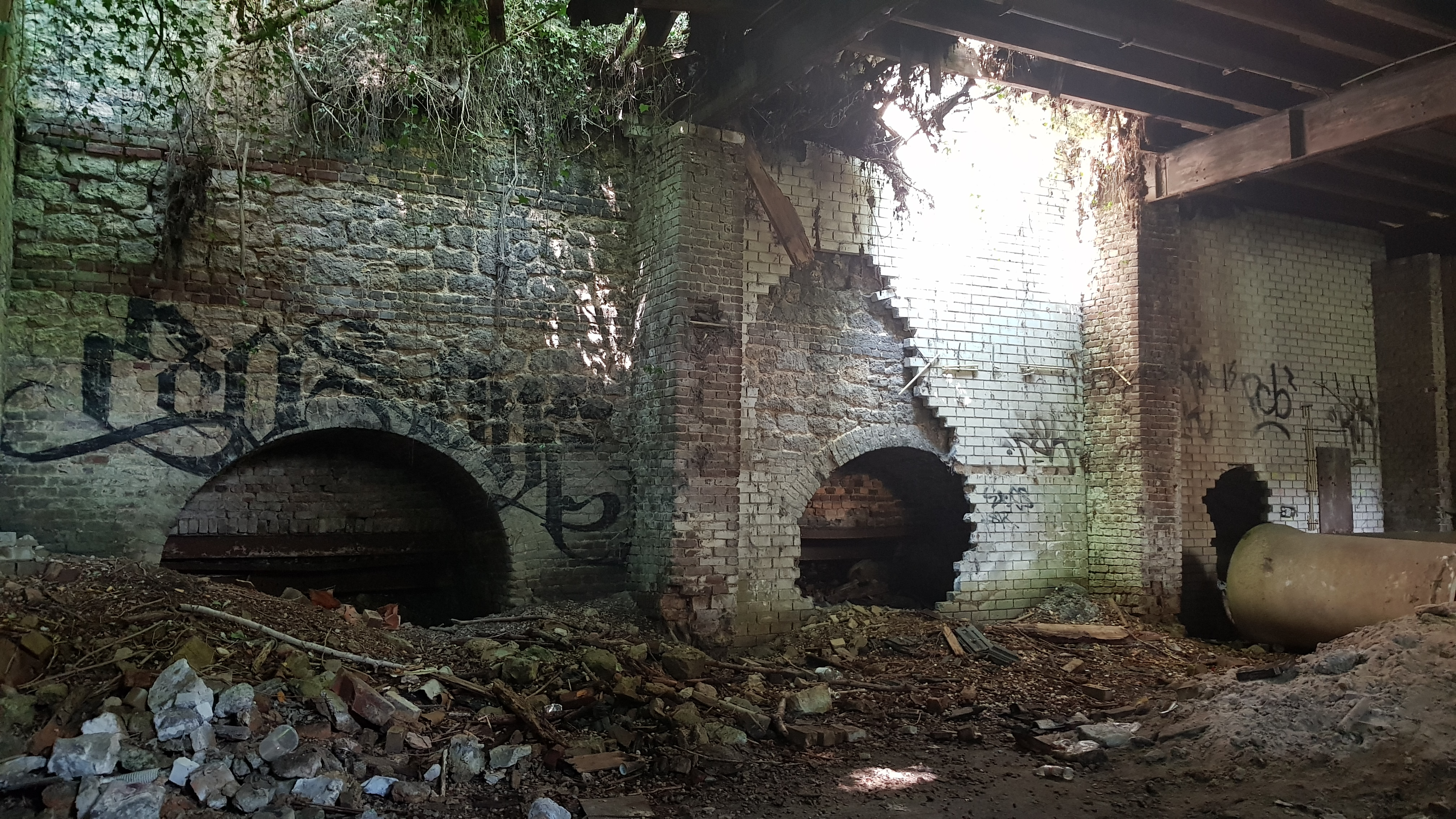 ovens I - II - III van Kalkovens Kurvers, Ubachsberg, Nederland